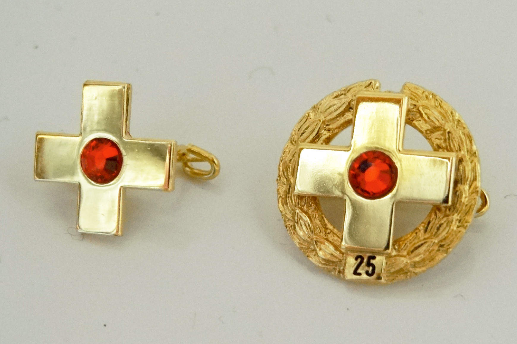 DRK Blutspendeehrennadeln für 10maliges und 25maliges Spenden